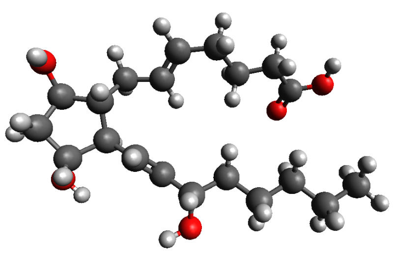 Простагландин F-2-алфа